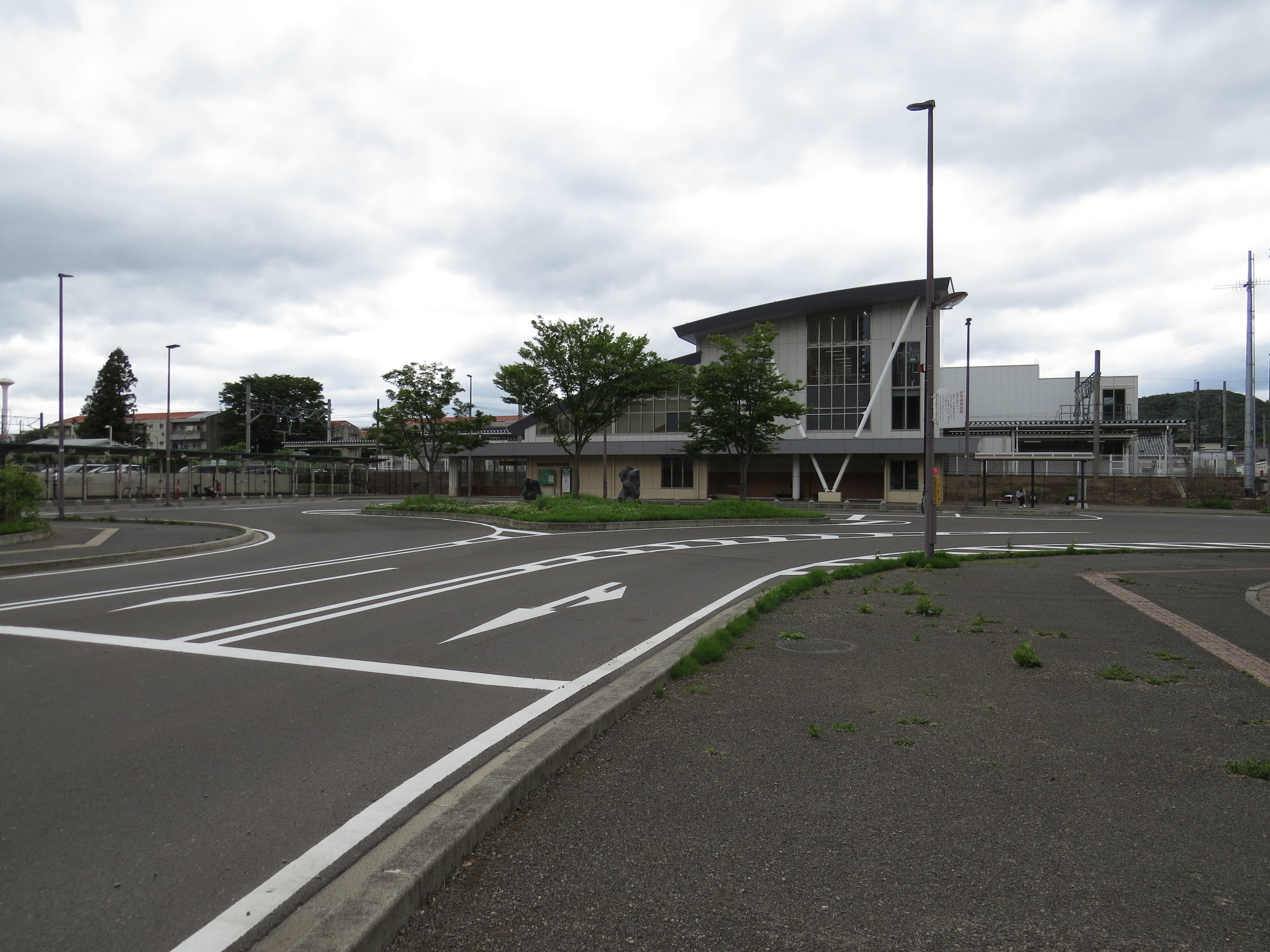 JR東日本 陸前落合駅 南口ロータリー